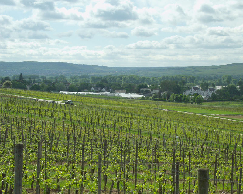 Blick über die Lage "Geisenheimer Fuchsberg" zu den Gewächshausanlagen der Forschungsanstalt Geisenheim, fotografiert 2004